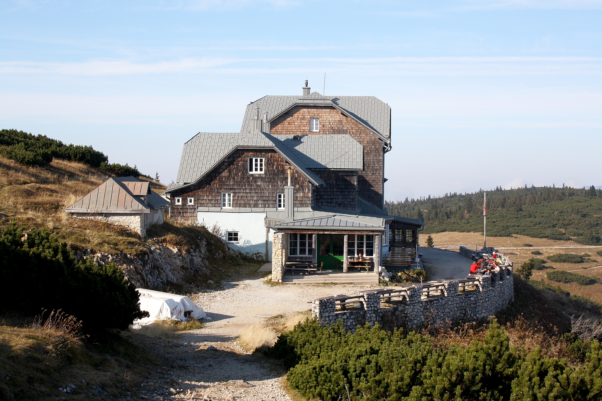 Südansicht des Otto-Schutzhauses auf der Rax in der niederösterreichischen Marktgemeinde Reichenau an der Rax.Das Schutzhaus wurde von der Sektion Reichenau des Deutschen und Österreichischen Alpenvereins errichtet und 1893 eröffnet. Unter Camillo Kronich, der fast ein halbes Jahrhundert als Hüttenwirt das Schutzhaus betrieb, wurde 1908/1909 nordseitig ein zweistöckiger Trakt mit 22 Schlafzimmern angebaut.